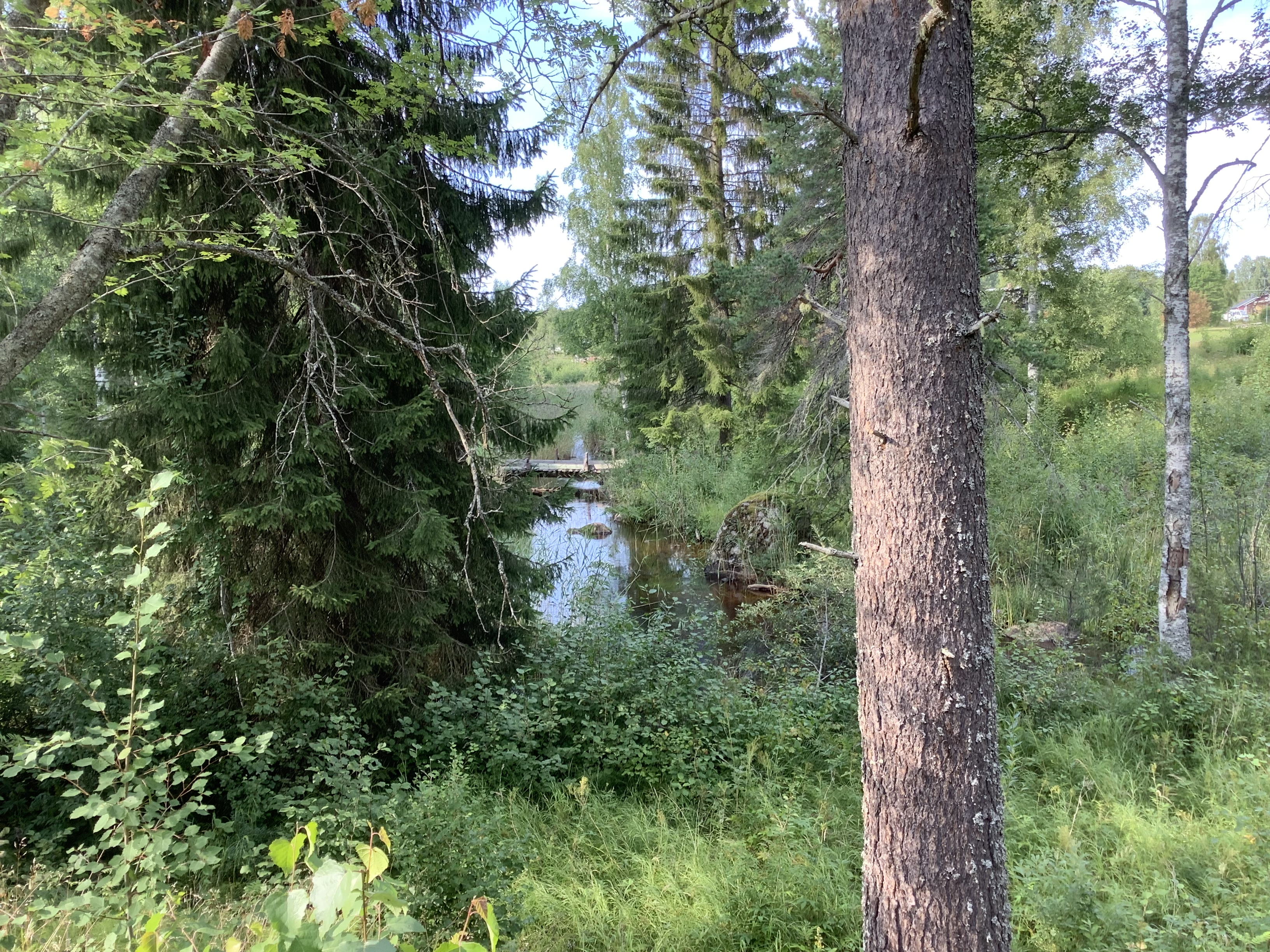 Kårån vid Kårböle stavkyrka (eller Sankt Olofs offerkyrka) i Kårböle i Ljusdals kommun.